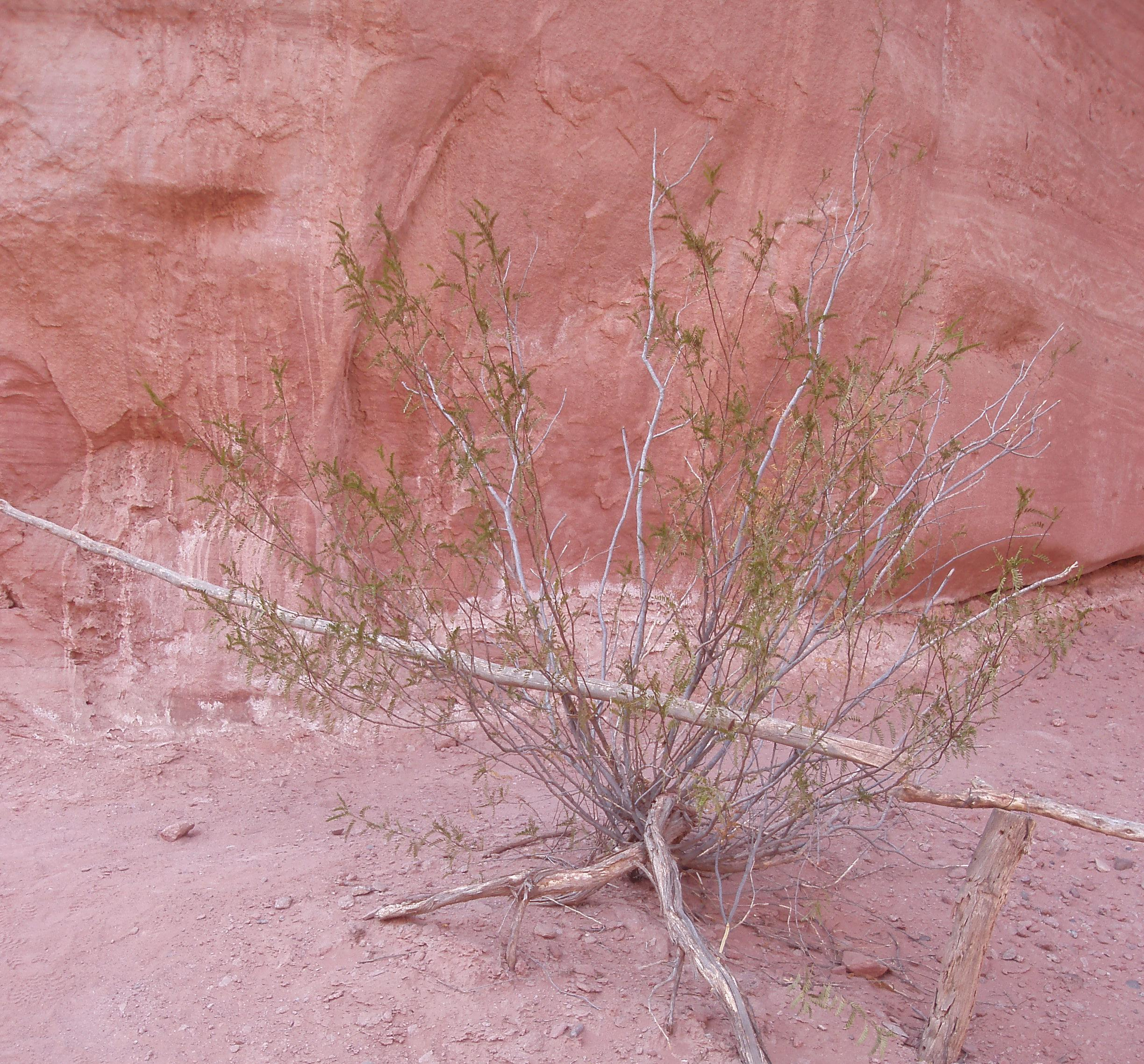 Zuccagnia punctata, Parque Nacional Talampaya, Argentina